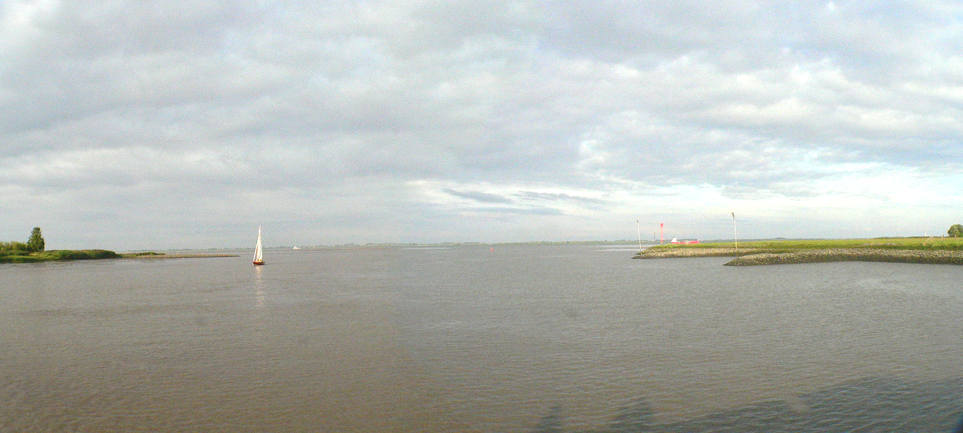 Unterelbe bei Glückstadt, Deutschland